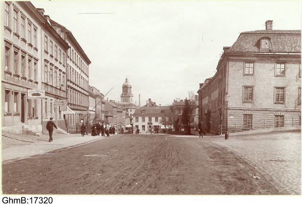 Kungsgatan Göteborg, foto från krönet av Hästbacken österut mot Domkyrkan, Bildsamlingen vid Göteborgs stadsmuseum, GhmB-17320.